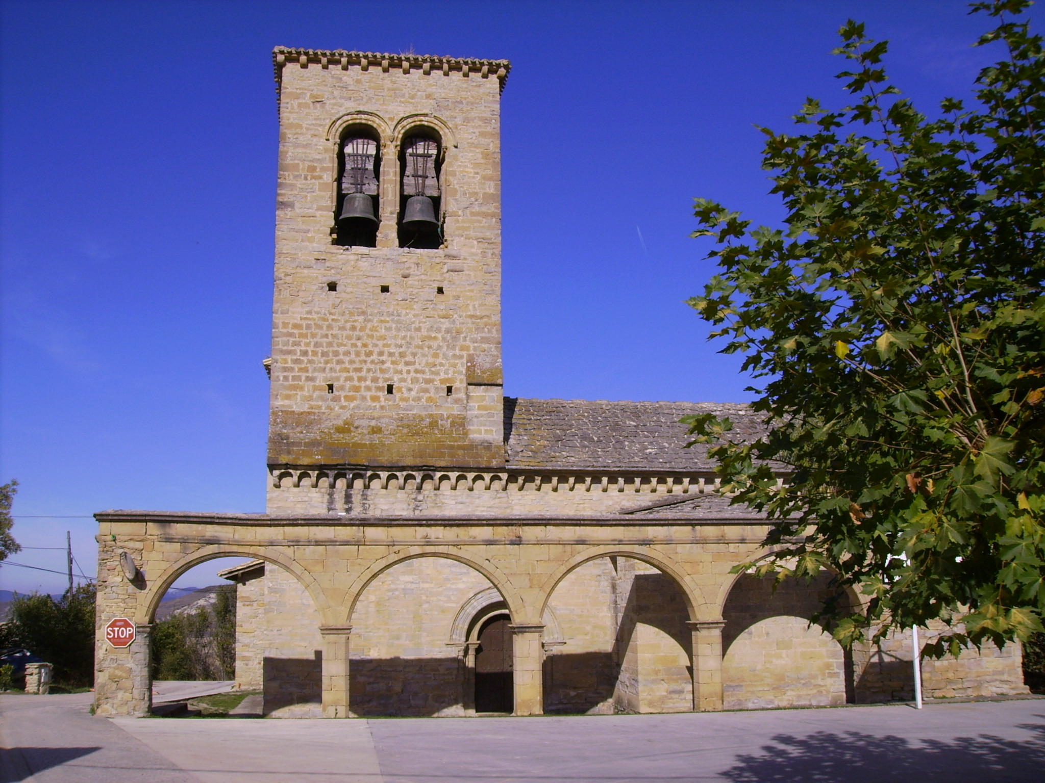 Iglesia parroquial de la Purificación